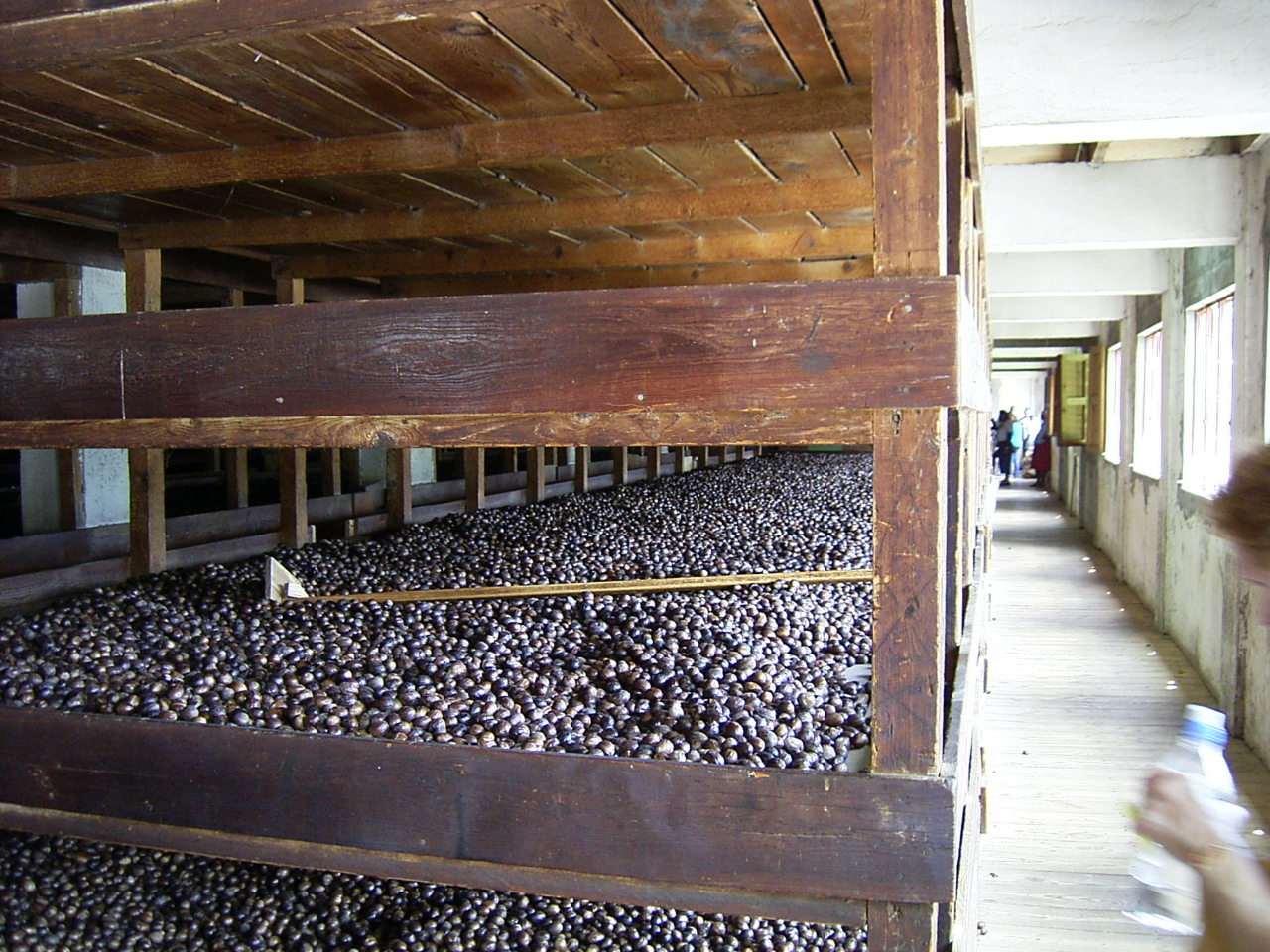 Muskatnuss-Fabrik Trocknungsgitter